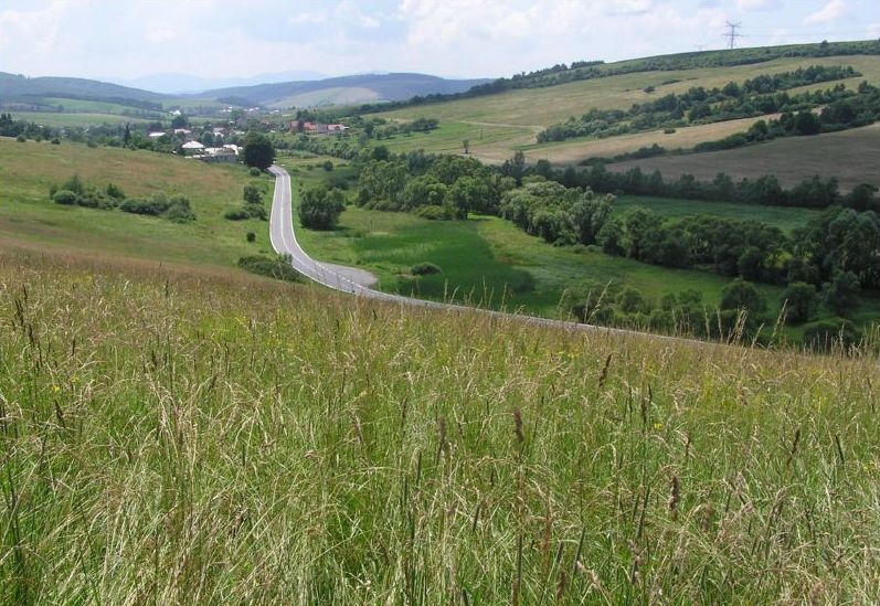 Celkový pohľad